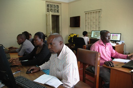 Ouganda -Projet DeSILISoR